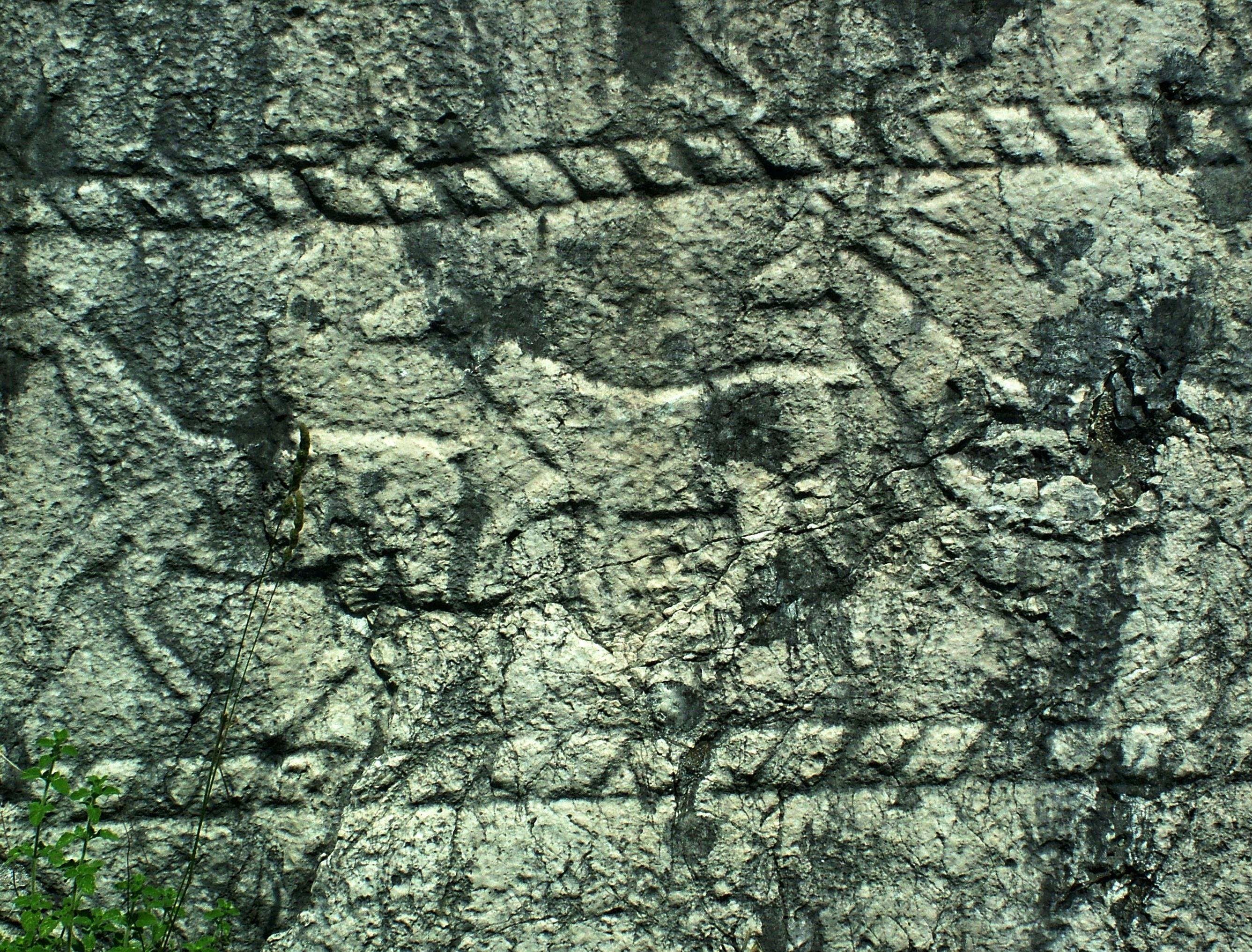 Radimlje, bogumil nekropolisz (Bosznia)